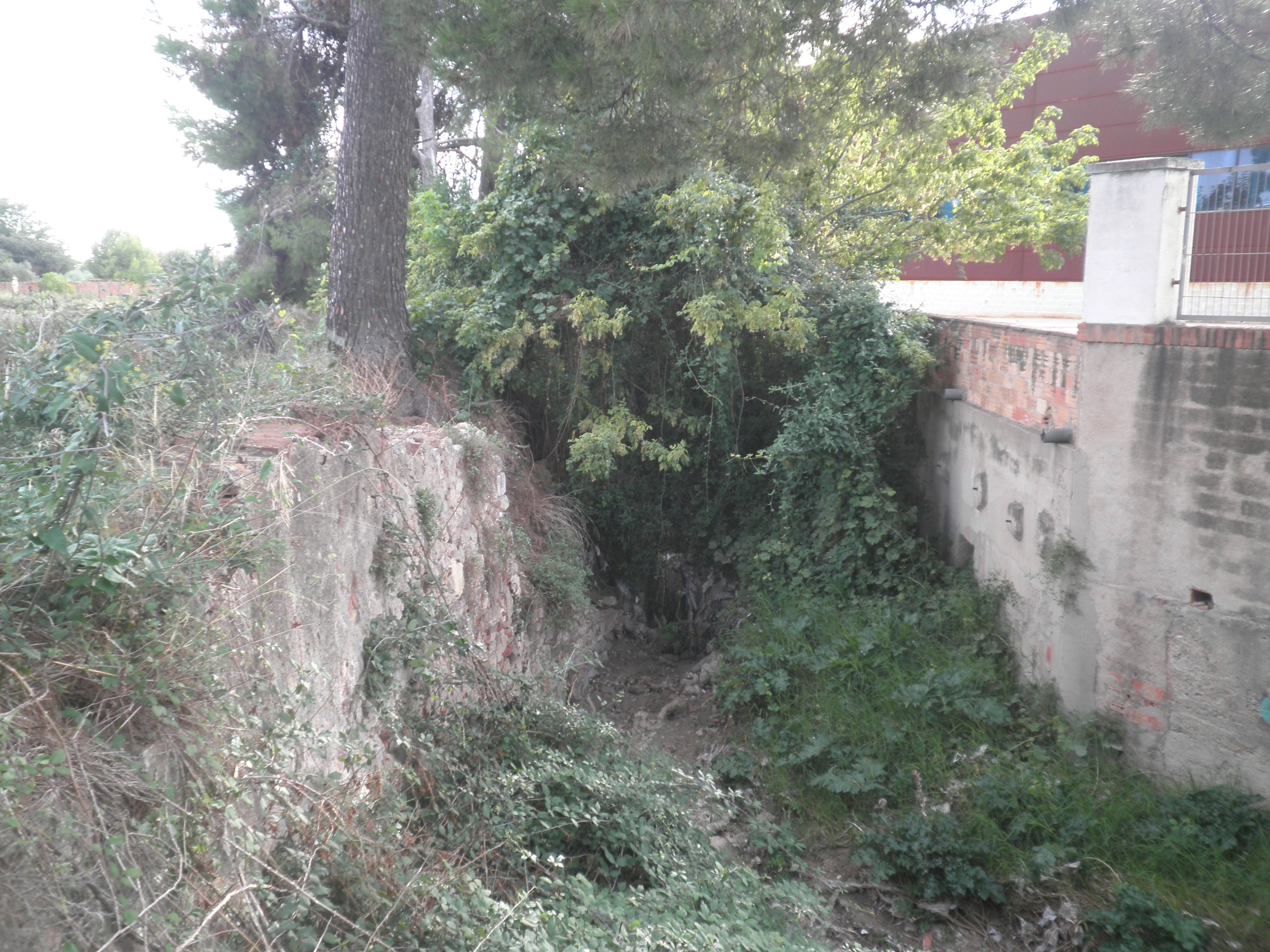 Barranc dels Capellans vora la carretera d'Alcolea, a Reus